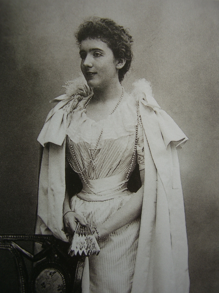 Marie de Benardaky (1874-1949), d'après une photo de Paul Nadar, 30 novembre 1893. Exposition à l'Orangerie de l’Hôtel de Sully, Paul nadar et le monde de Proust, 13 février-13 mai 1991.